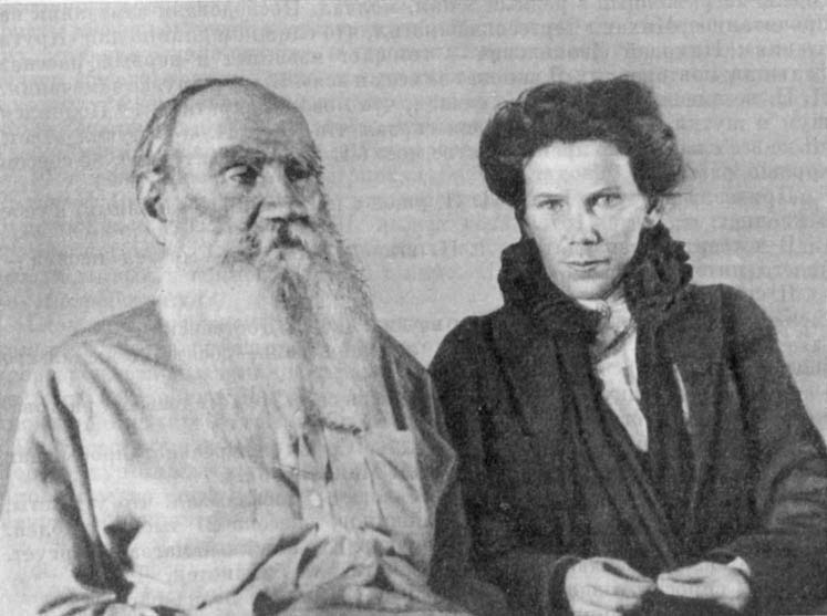 Толстой с дочерью Марией Львовной. 1906. Фото В. Г. Черткова